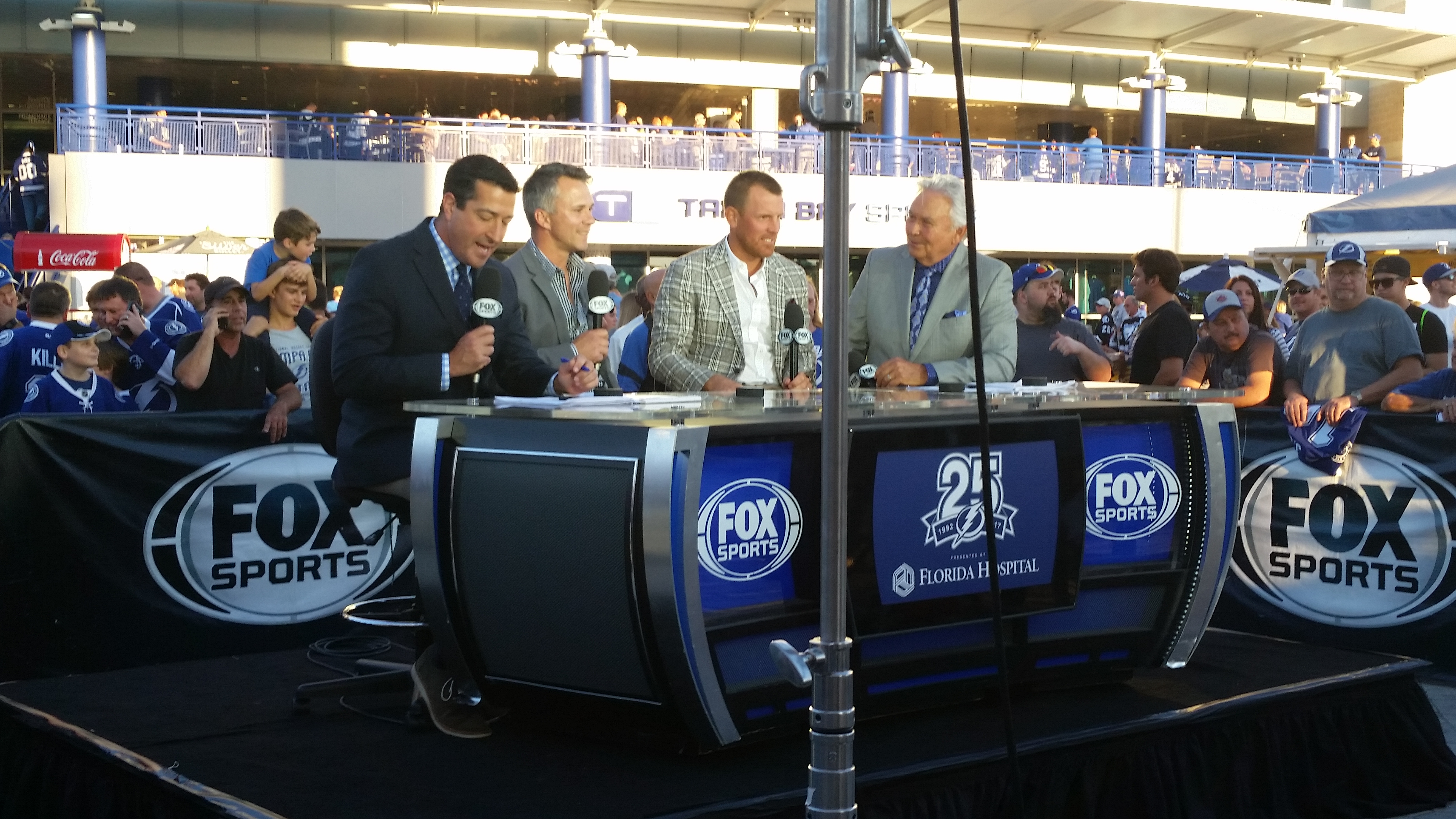 Amalie Arena 401 Channelside Dr, Tampa, FL 33602 US